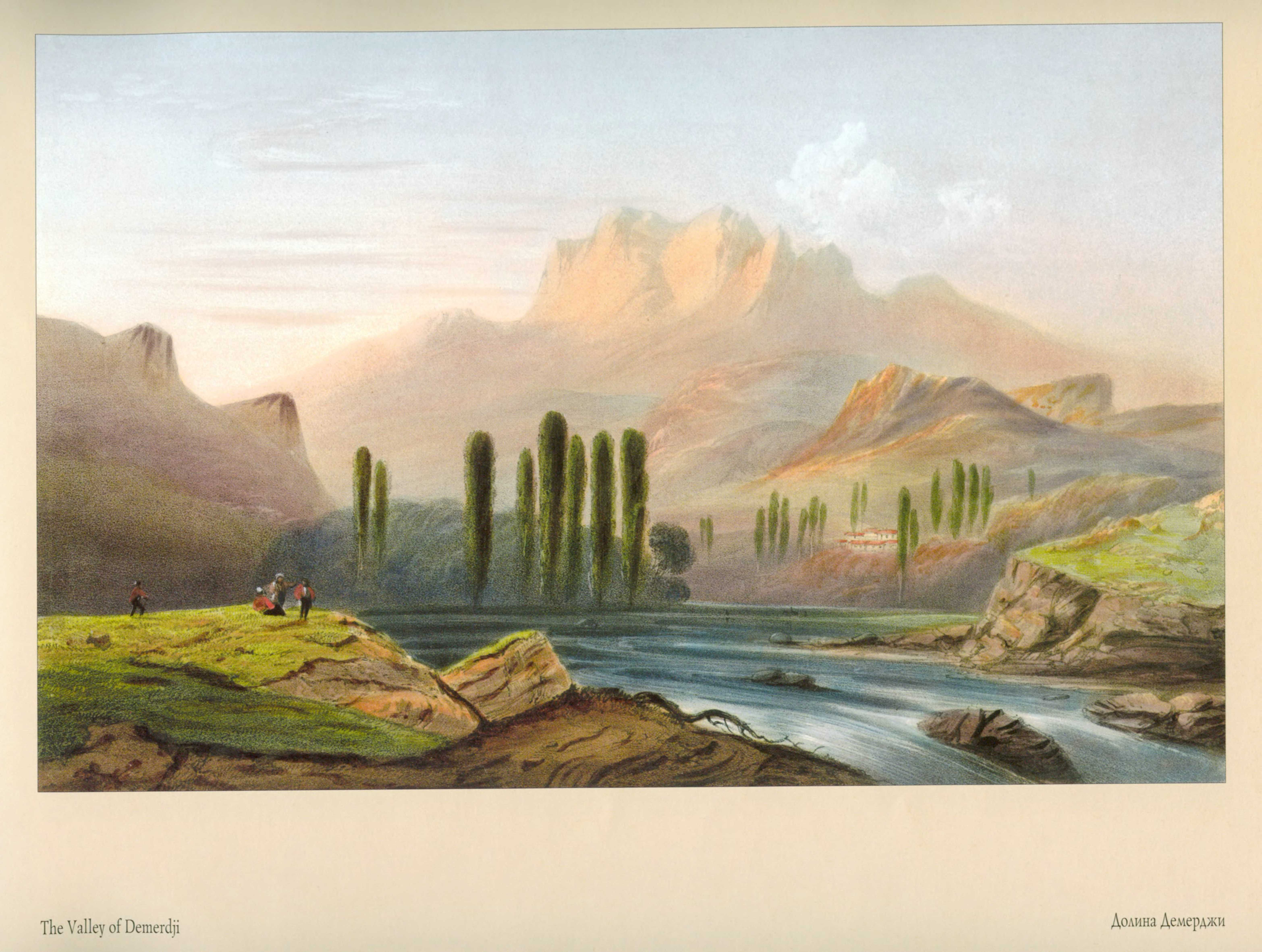 Карло Боссоли. Долина Демерджи